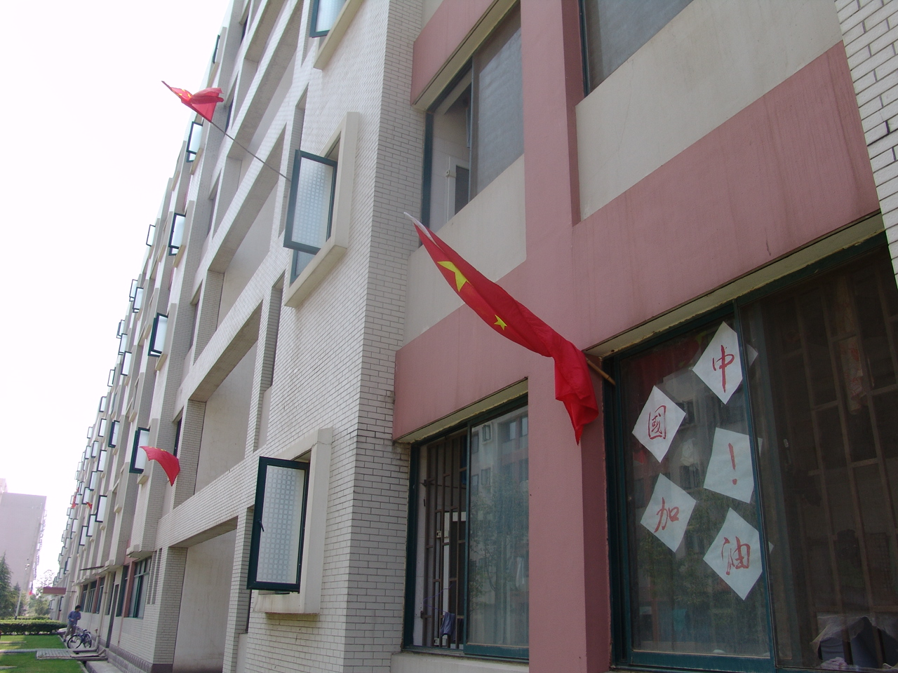 湖北经济学院栎苑学生公寓